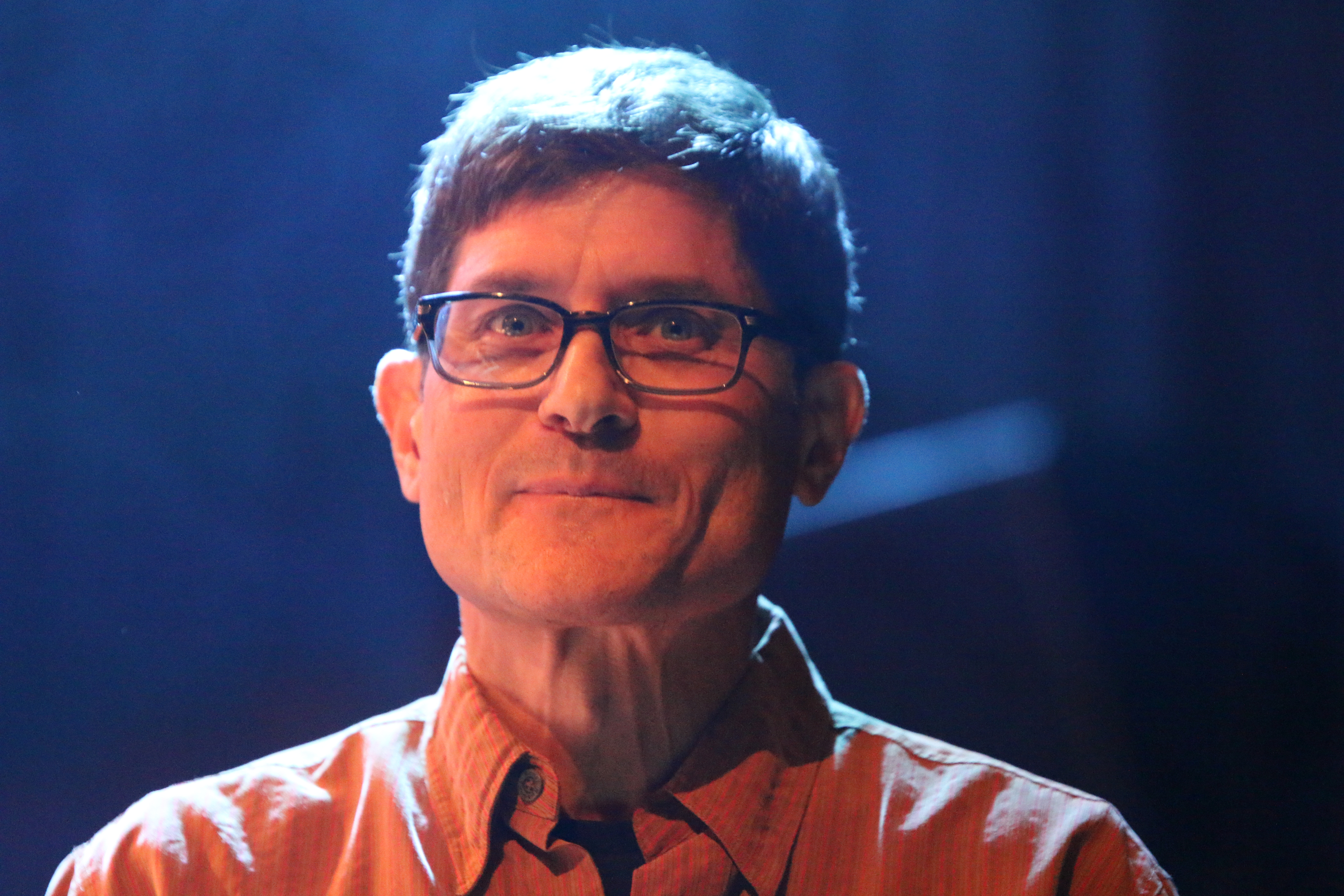 46. Deutsches Jazzfestival Frankfurt 2015: hr-Bigband: Mike Holober